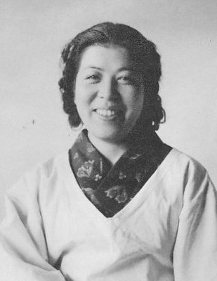 太宰治の最初の妻小山初代